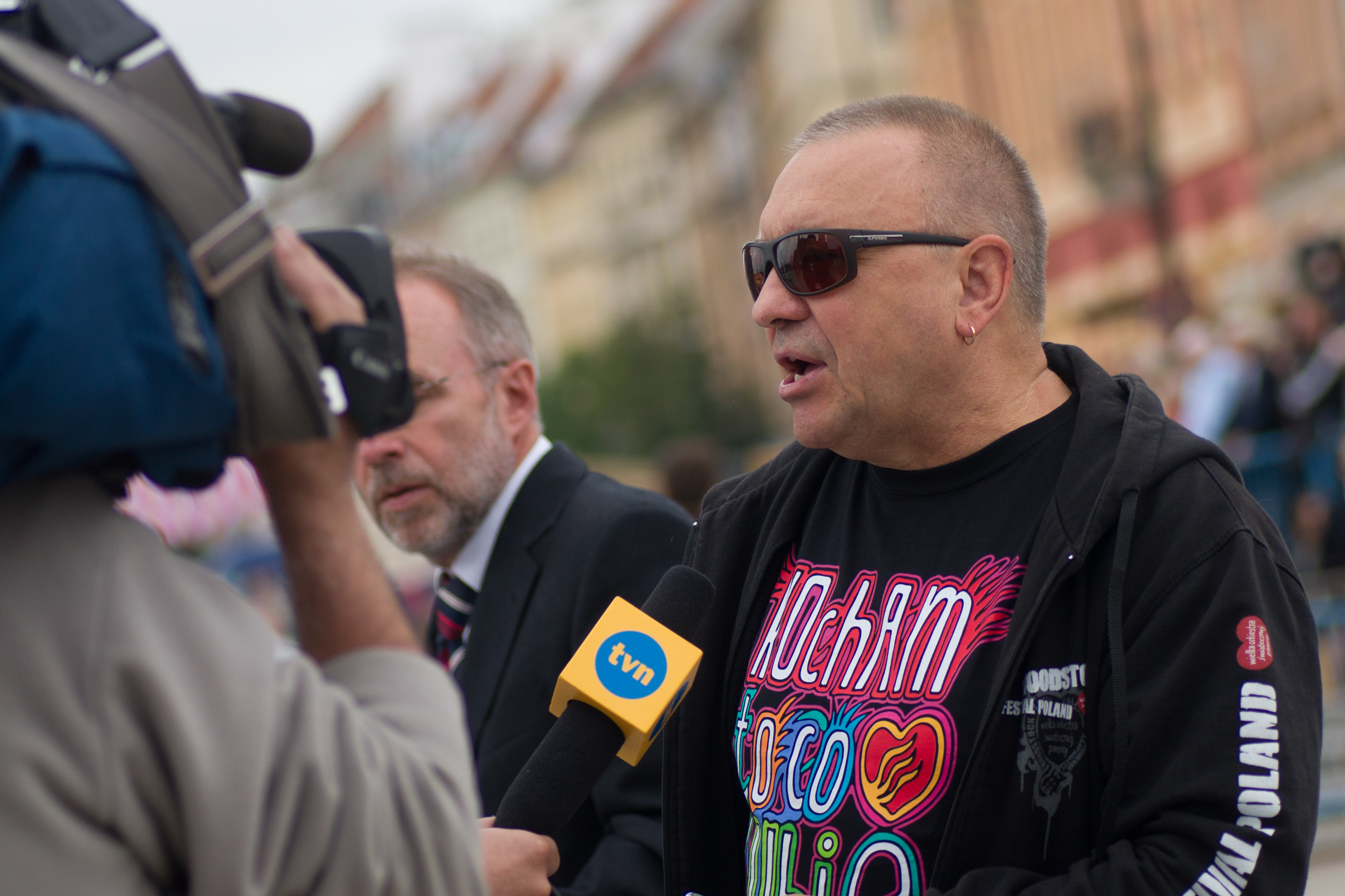 Poland 25th Anniversary of Freedom - with President Barack Obama, President Bronisław Komorowski and Prime Minister Donald Tusk - 4 June 2014 - Warsaw, Poland